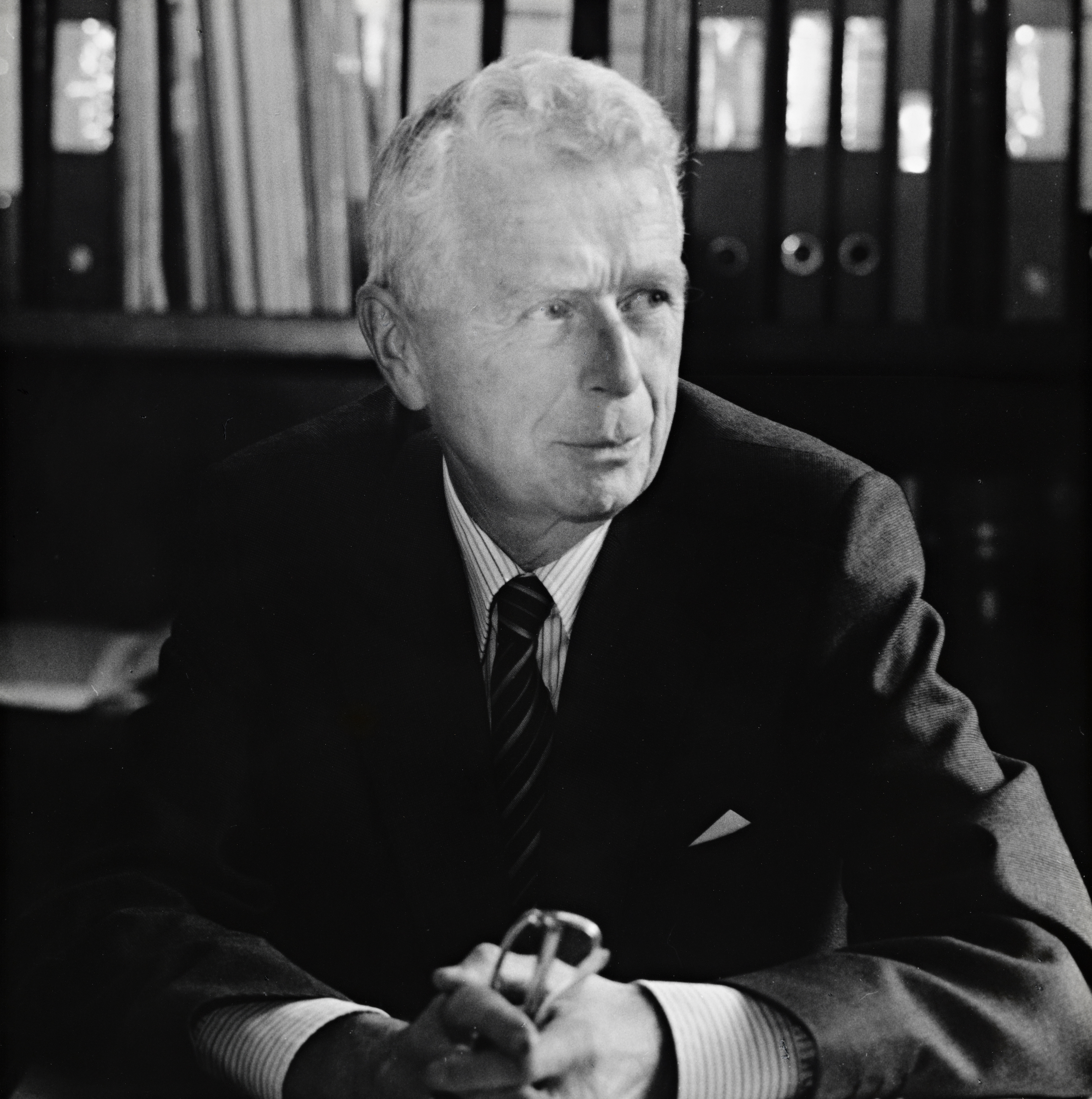 Beskrivelse / Description: Gerhard Munthe var universitetsbibliotekar ved Universitetsbiblioteket i Bergen 1947, sjefsbibliotekar ved Det Kongelige Norske Videnskabers Selskab 1964, overbibliotekar ved Universitetsbiblioteket i Oslo 1970 og Riksbibliotekar 1975–86 (kilde: snl.no). Dato / Date: ukjent / unknown Fotograf / Photographer: ukjent / unknown Digital kopi av original / Digital copy of original: s/h papirpositiv Eier / Owner Institution: Nasjonalbiblioteket / National Library of Norway Lenke / Link: Bildesignatur / Image Number: blds_06059